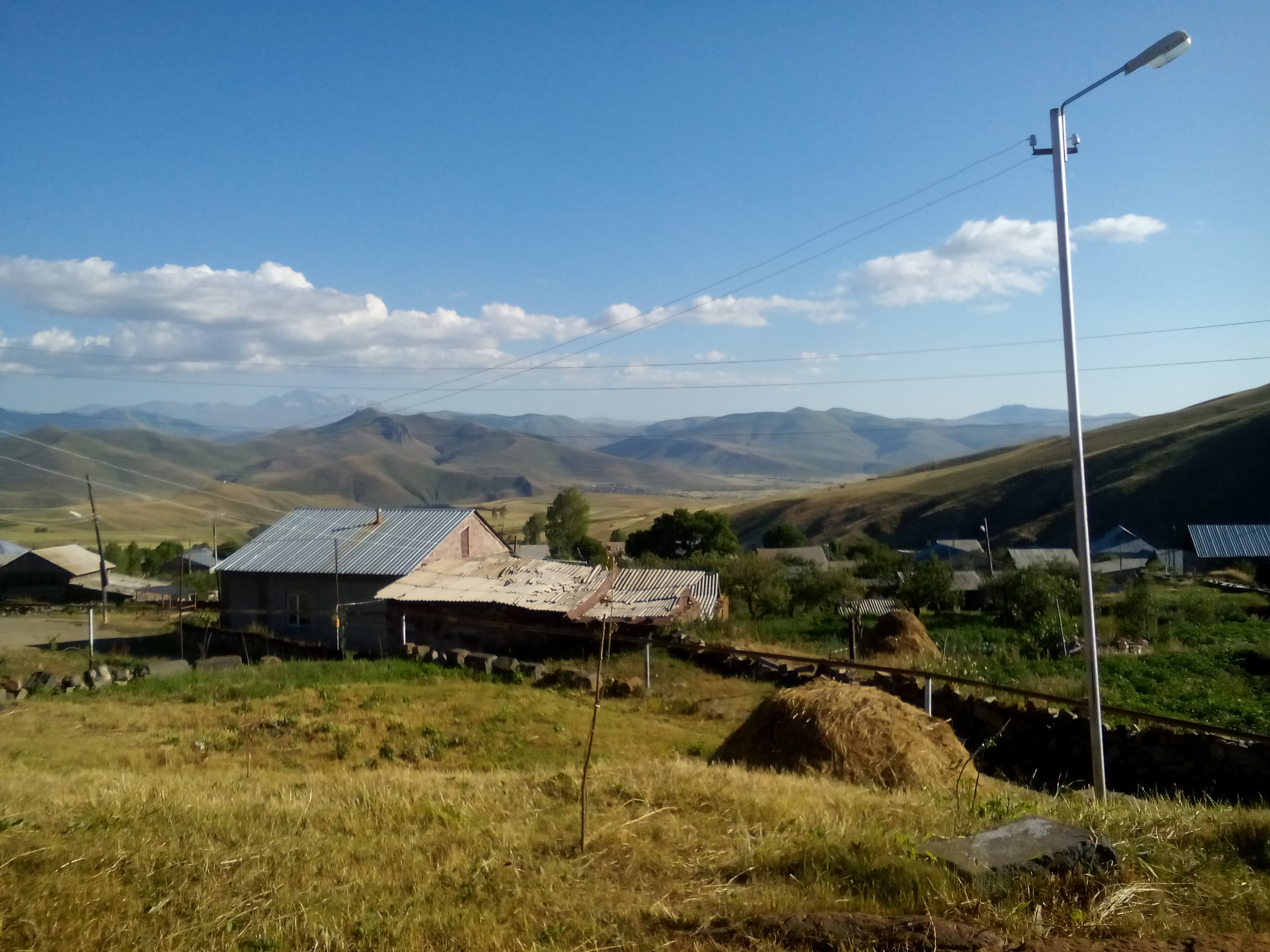 ܐܪܡܝܐ : Գոգարան գյուղ